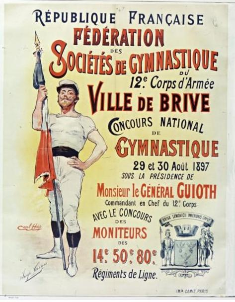 République française. Fédération des sociétés de gymnastique du 12° Corps d'Armée. ville de Brive Concours national de gymnastique 29 et 30 Août 1897 - Impr. Camis (Paris)